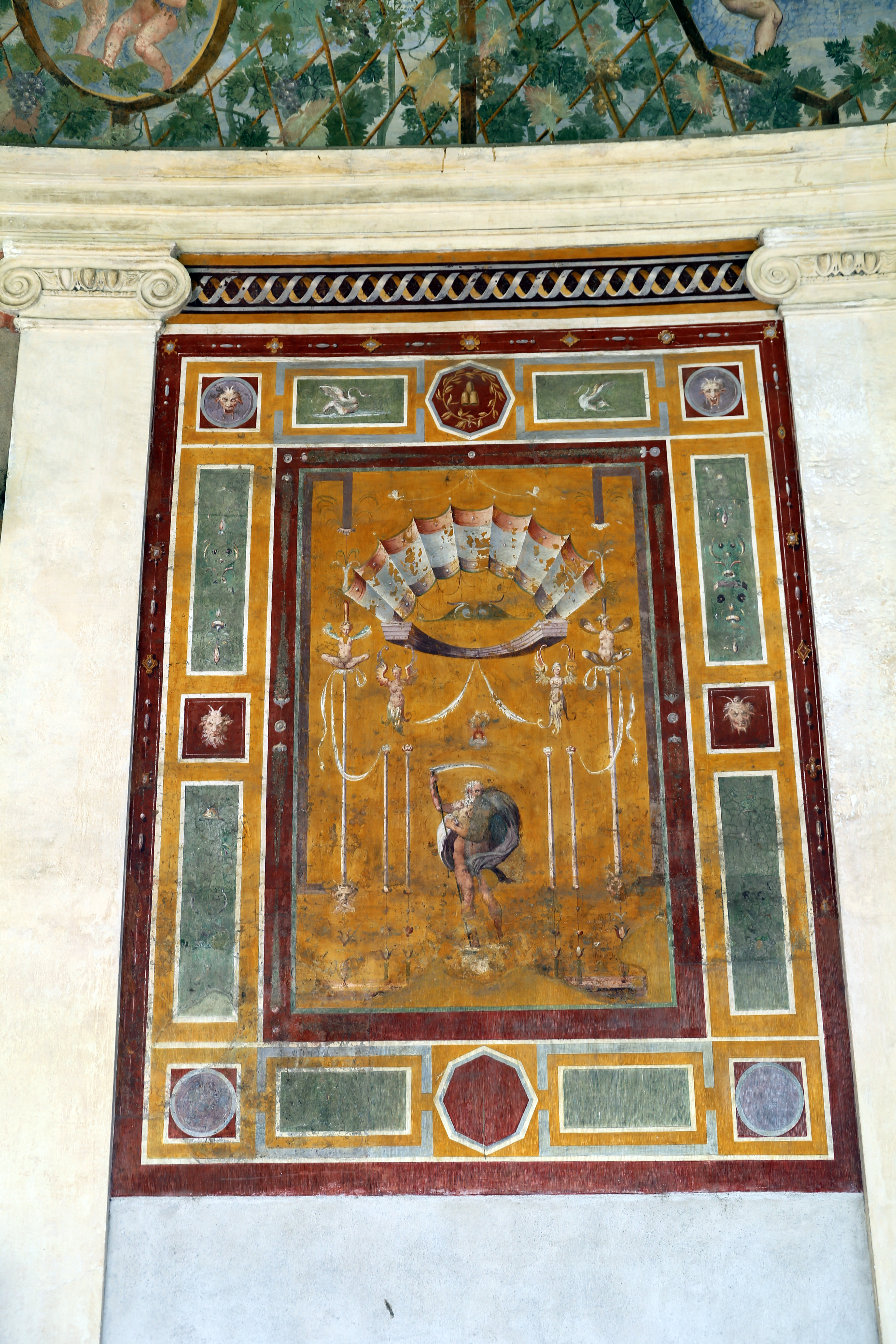 Villa Giulia (Rome) This is a photo of a monument which is part of cultural heritage of Italy.